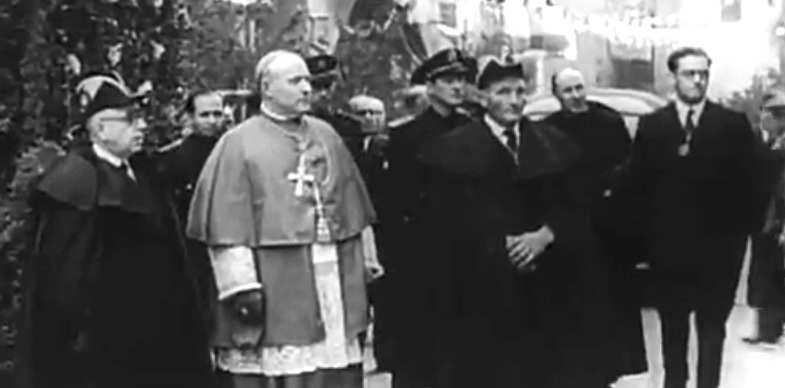 Entronización del Doctor Iglesias como Príncipe de Andorra 1942